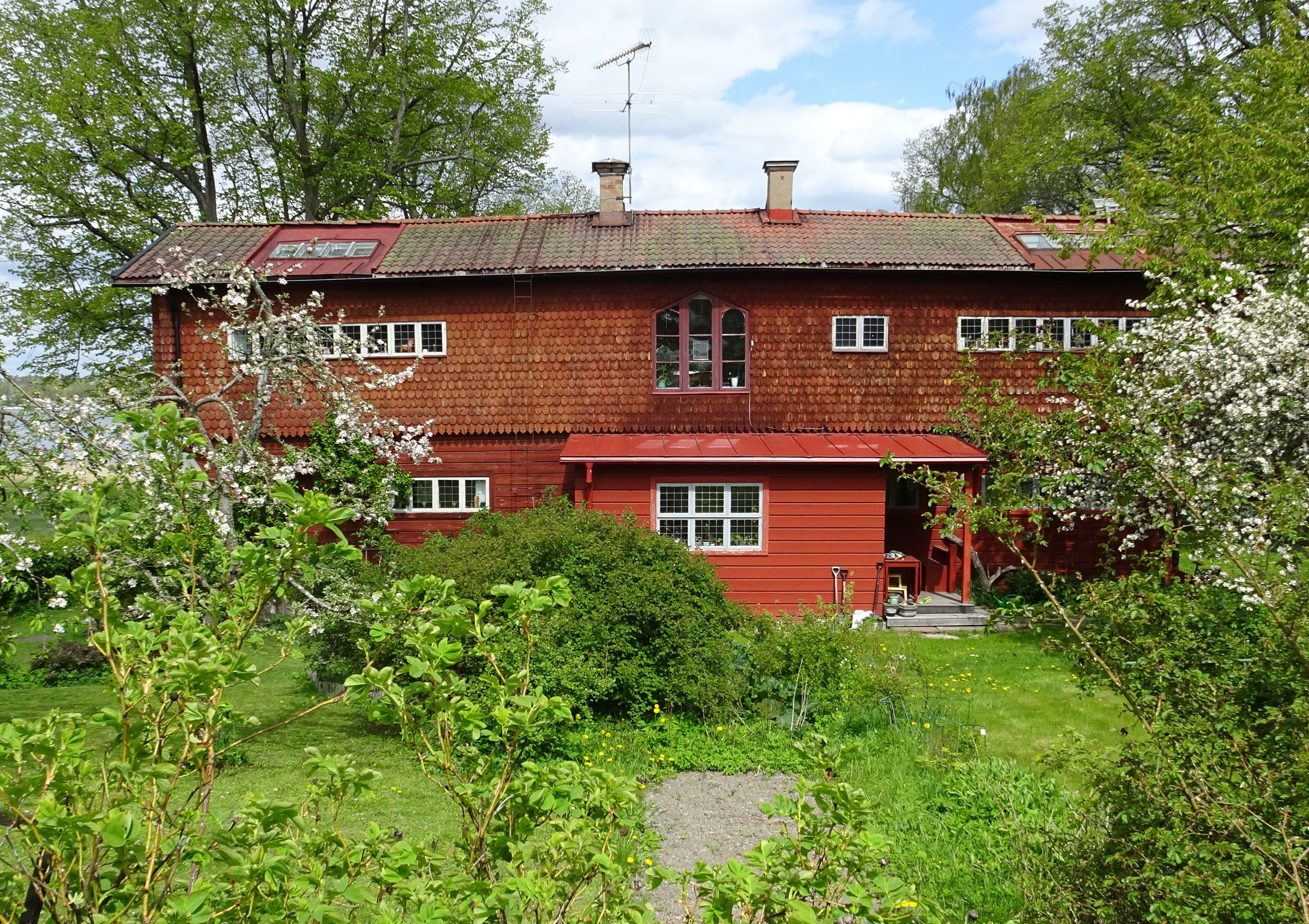 En kopia av Ornässtugan (byggd med hjälp av arkitekten Fredrik Wilhelm Scholander) tjänstgjorde som Sveriges kansli och utställningshall vid världsutställningen i Paris 1867. När utställningen var över lät kung Karl XV återuppbygga loftbyggnaden i Ulriksdals slottsträdgård där den finns än idag.